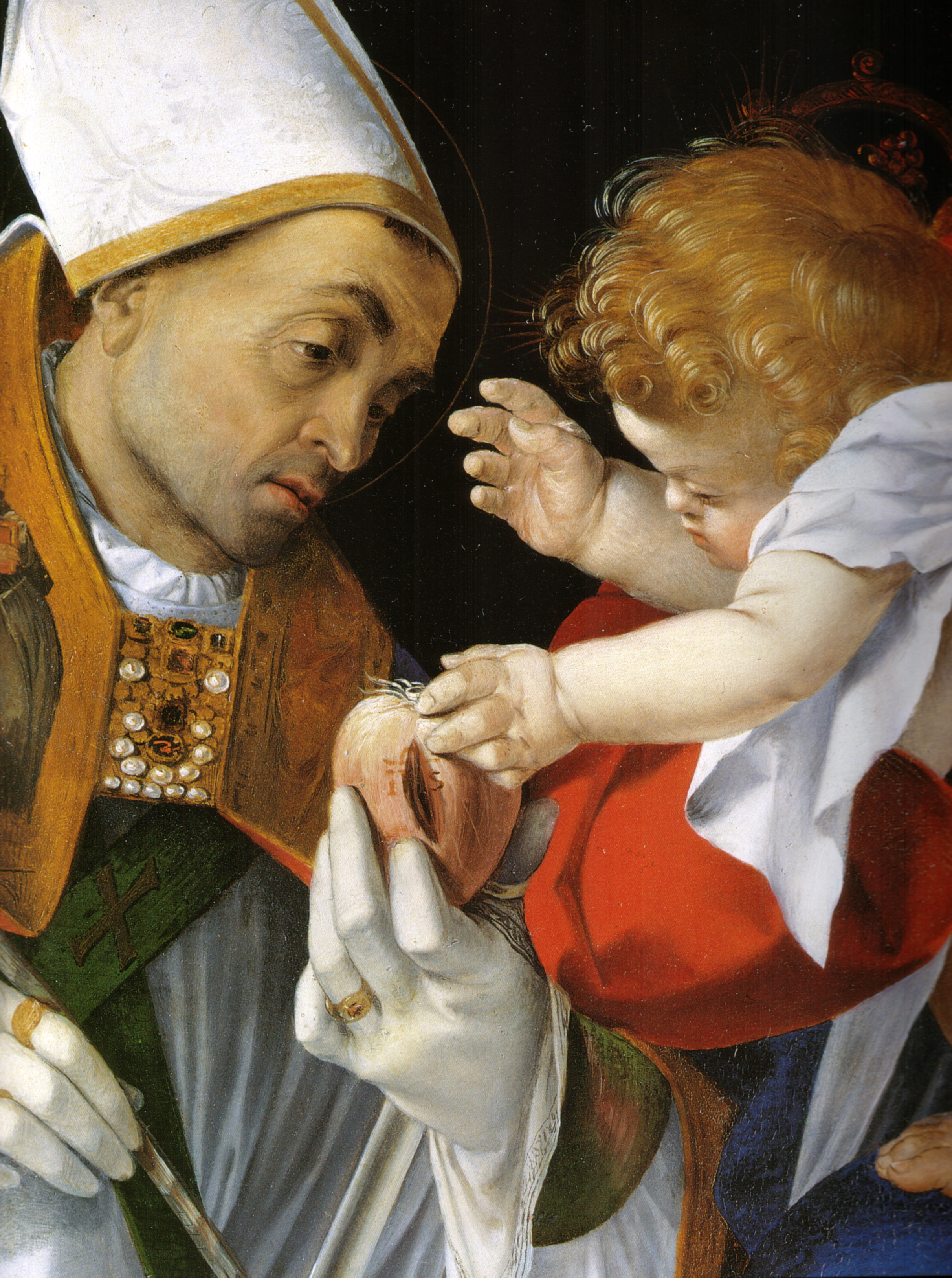 detail